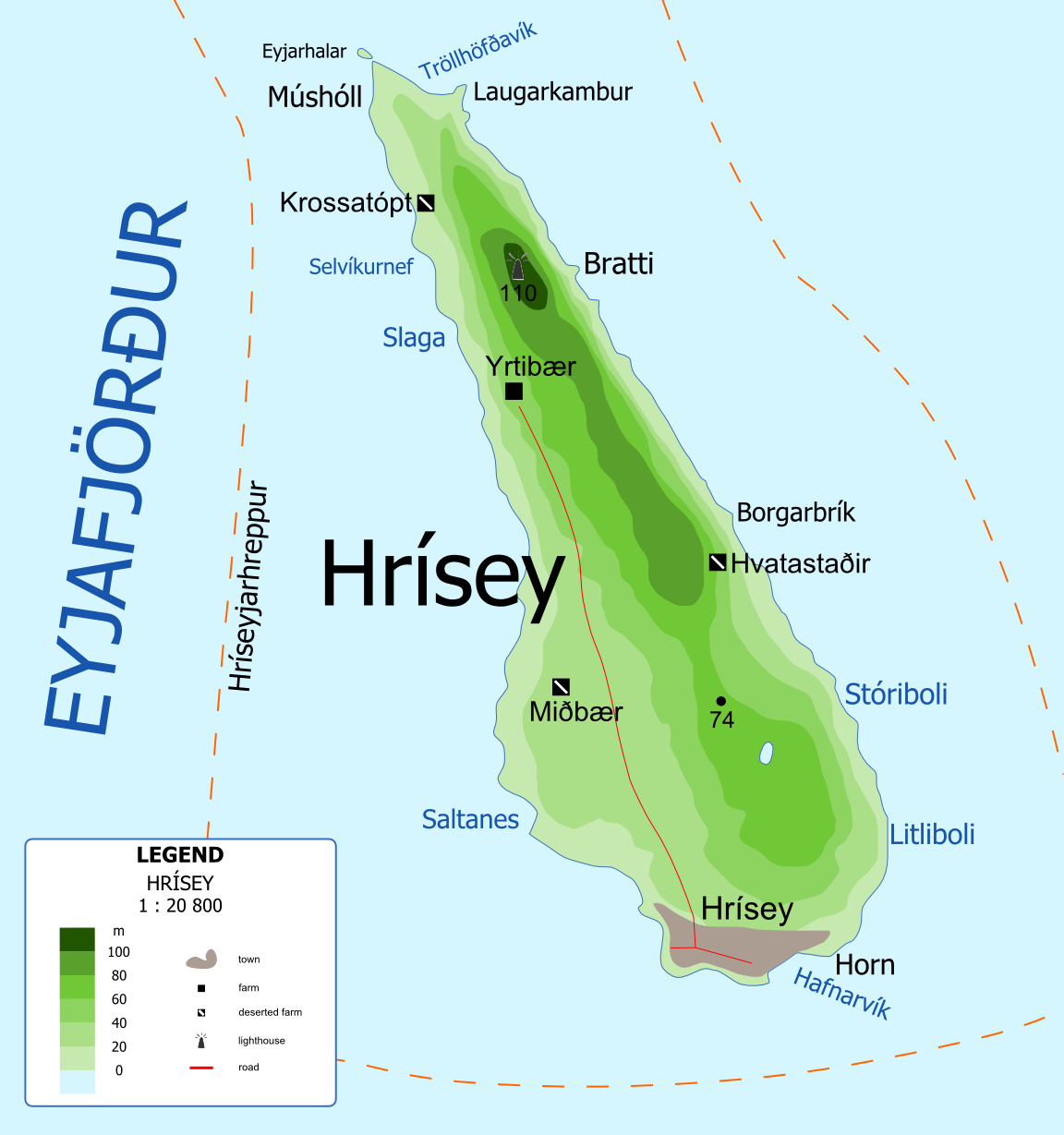 Hrisey